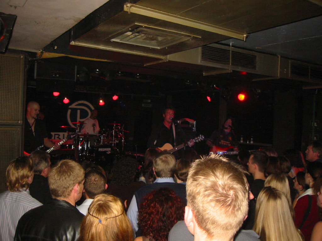 Watershed im Prime Club Köln